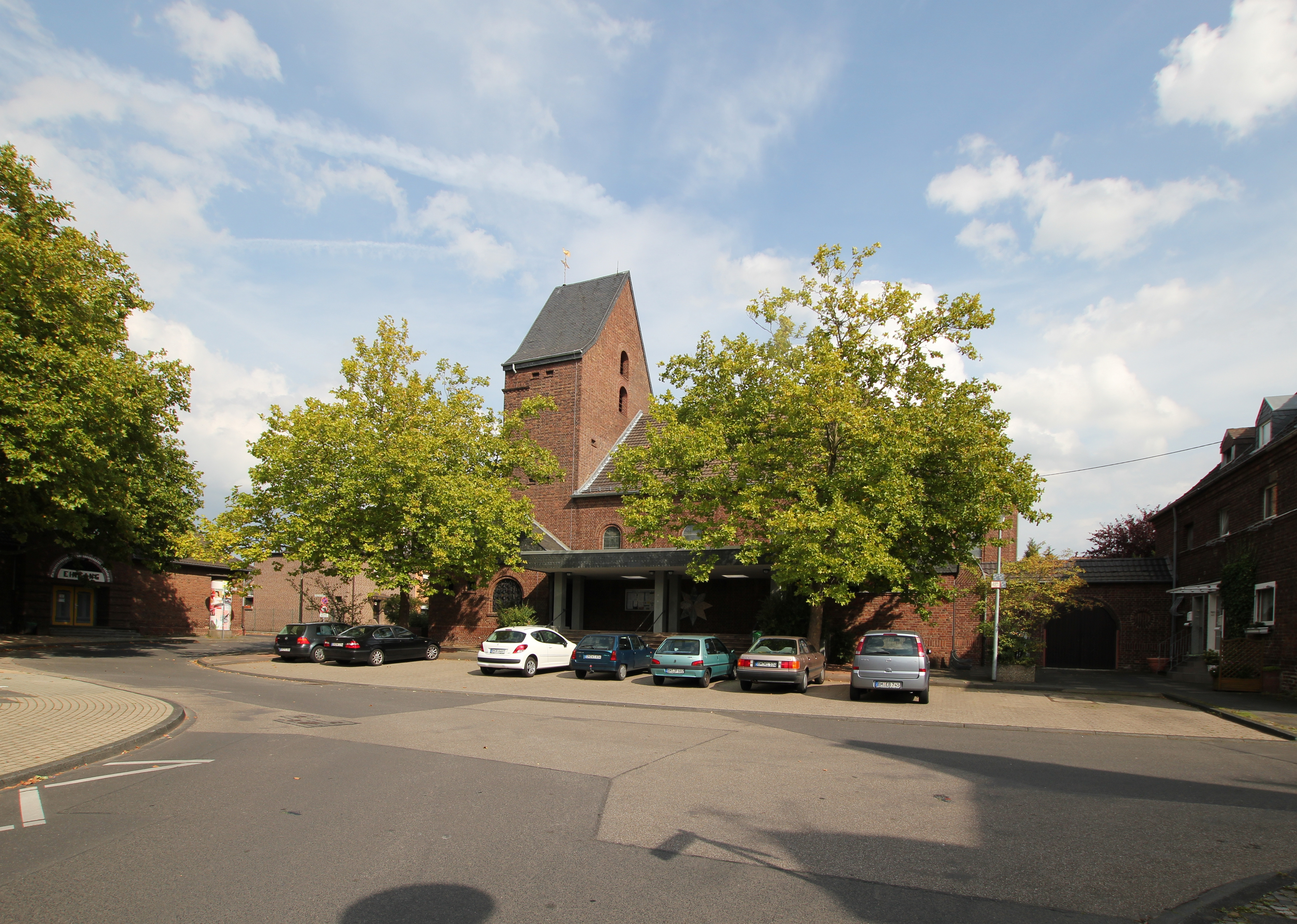 Erftstadt-Köttingen, Pfarrkirche St. Josef